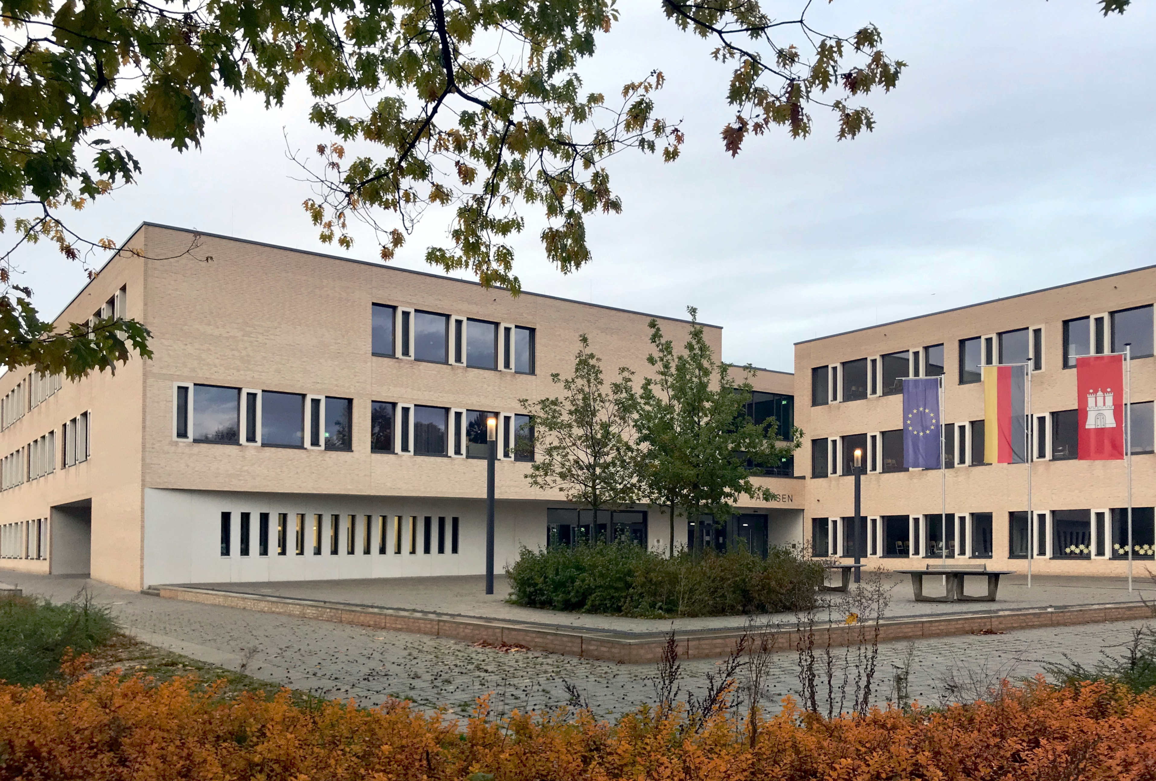 Gymnasium Farmsen in Hamburg, Eingangsbereich des Neubaus (errichtet 2015-17) von der Swebenhöhe aus.